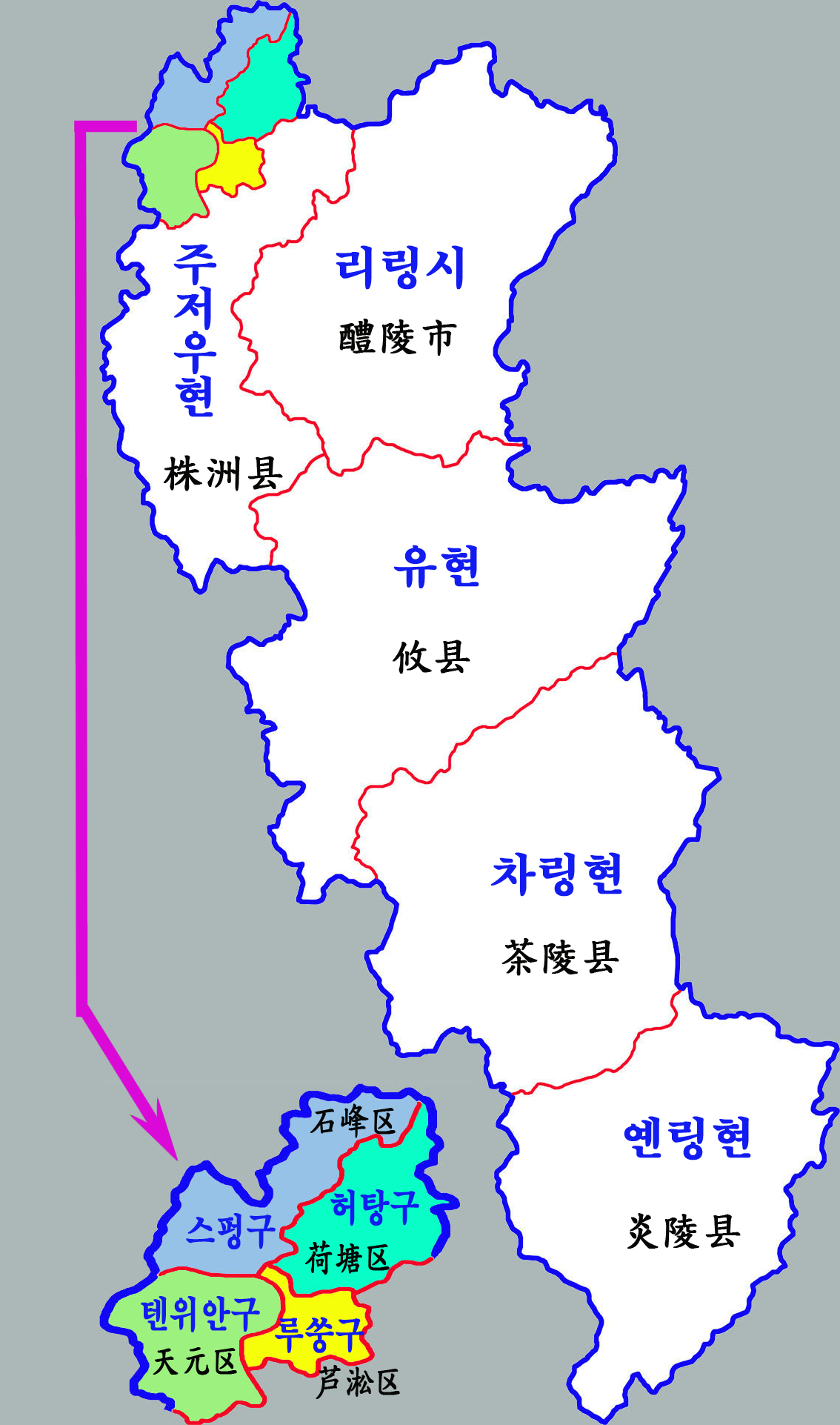 주저우시 현급구역도